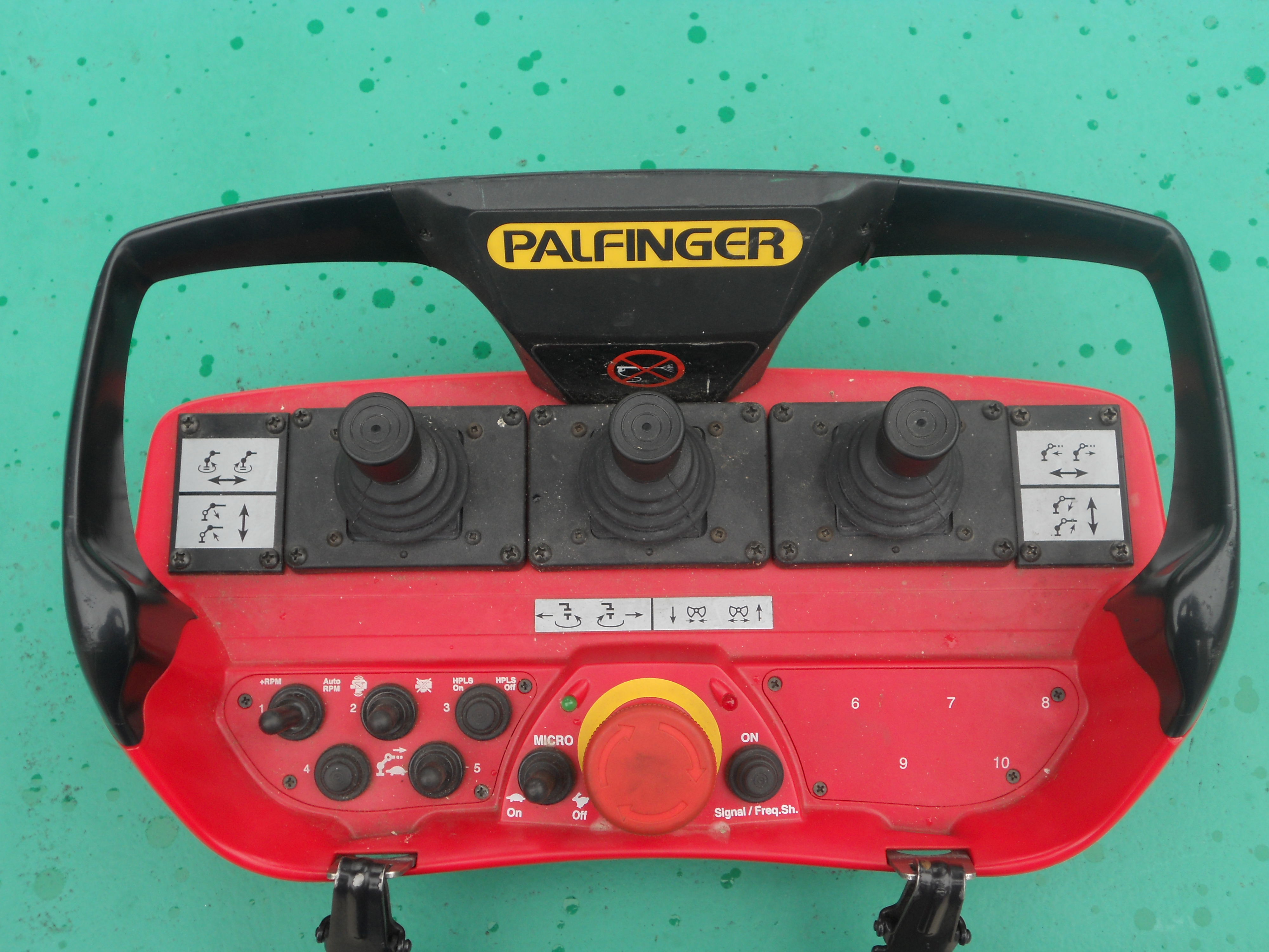 Stikalo za izklop v sili